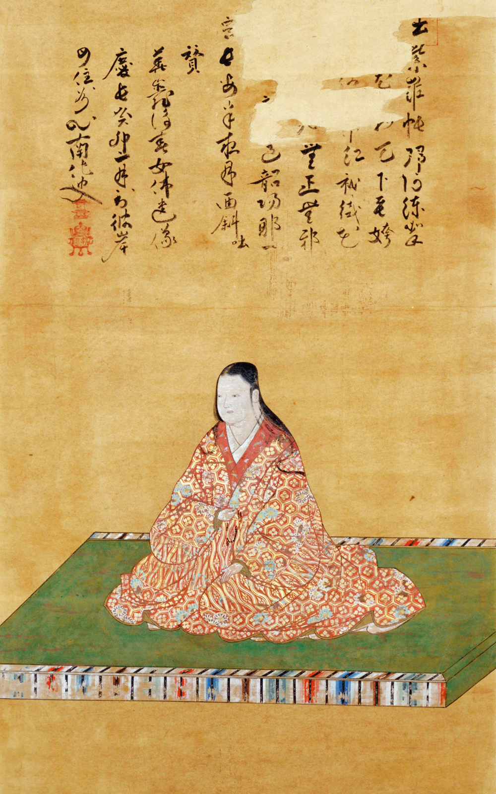 二条昭実夫人像 韶陽院殿（織田信長女） 南化玄興賛。（模写） 原典は京都府雑華院所蔵。